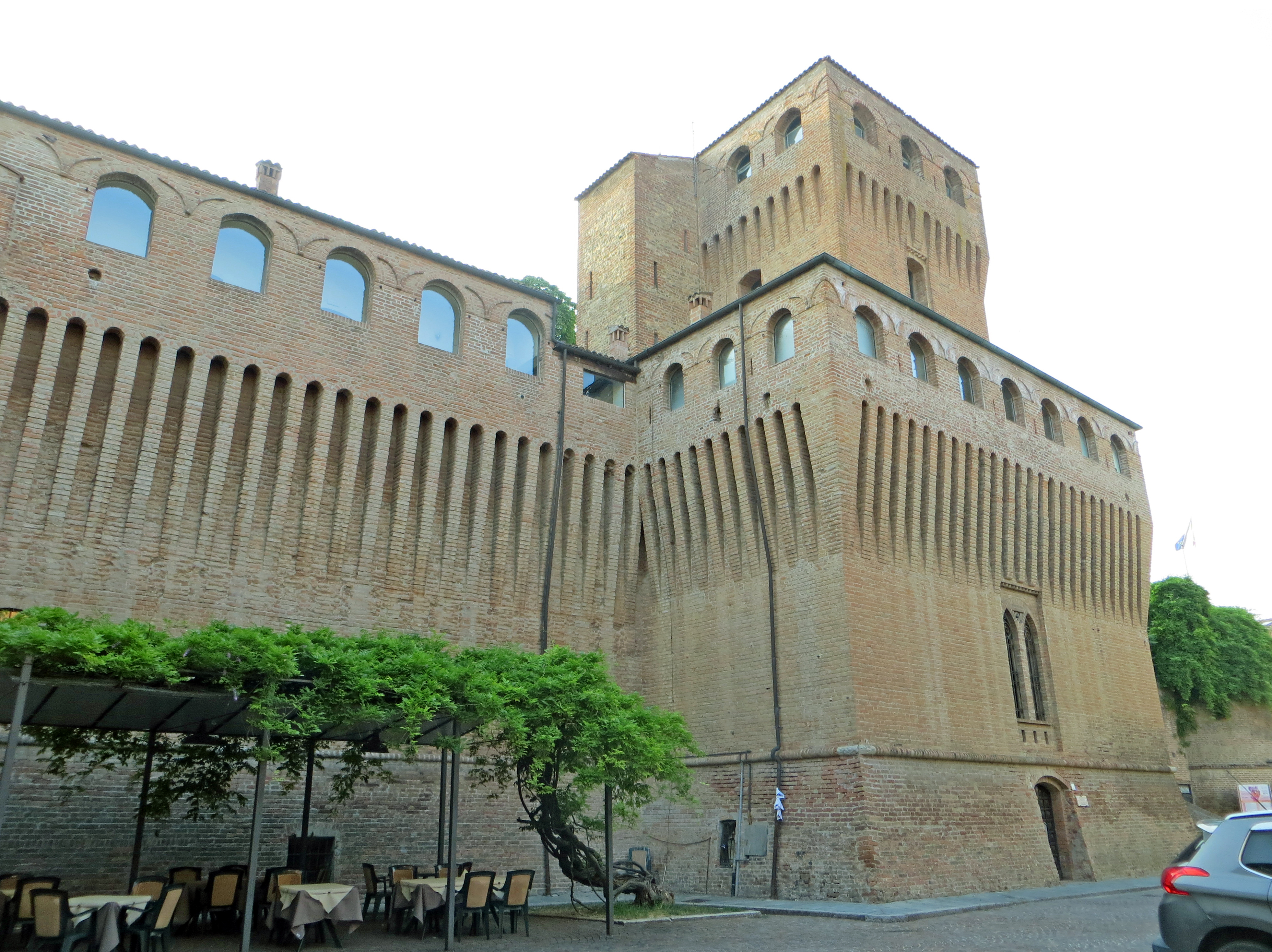 Rocca dei Sanvitale (Noceto) - facciata e mastio